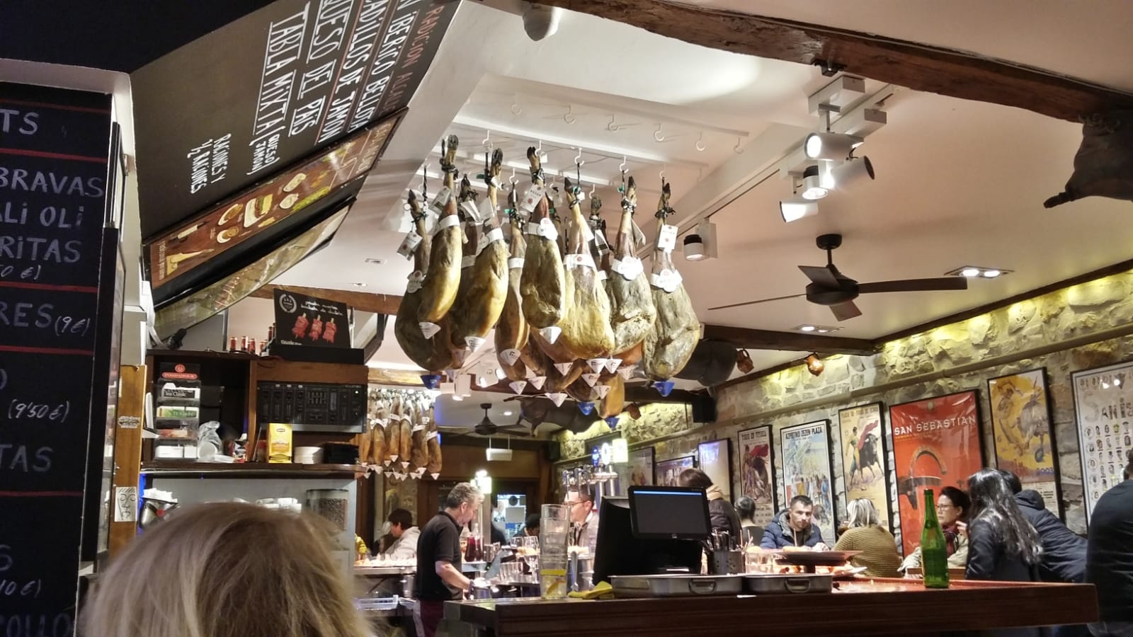 Taberna atiborrada de objetos, hay cosas en las paredes y cuelgan cosas del techo.